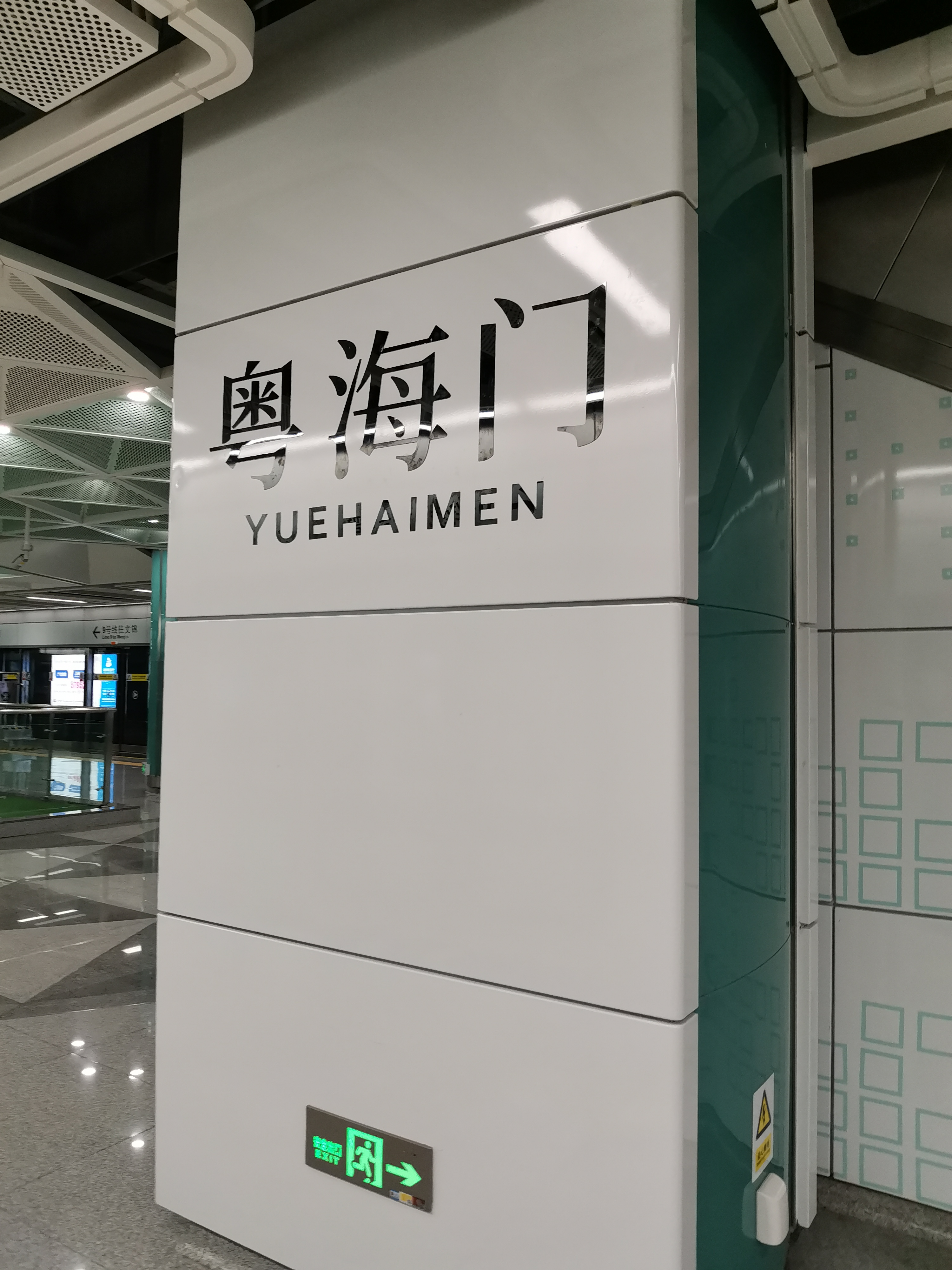 粤海门站站名大字